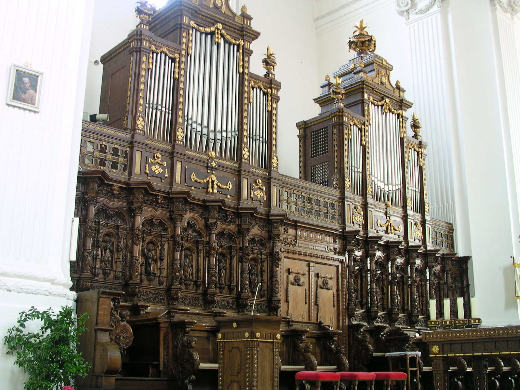 Pfarrkirche St. Verena in Rot an der Rot, linkes Chorgestühls von Andreas Etschmann (1693) linke Chororgel von Johann Nepomuk Holzhey (1785ff) (siehe weitere Bilder)